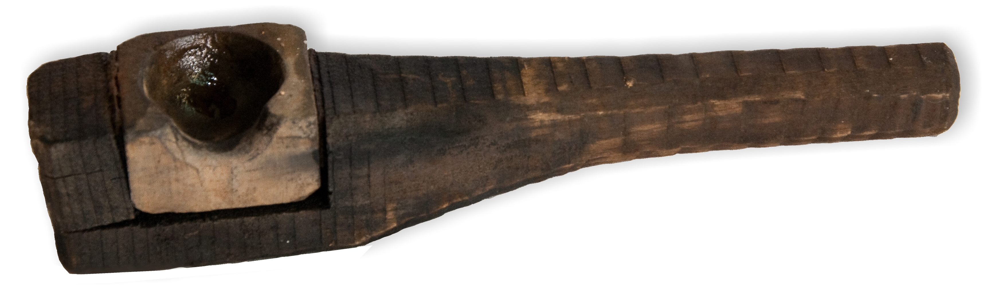 Česky: Používá se při výrobě kuliček mezi stonkem a kalíškem. Sklárna Nenačovice, okres Beroun. This picture was taken and/or got within the scope of the 'Acquiring scientific and specialized pictures' grant.